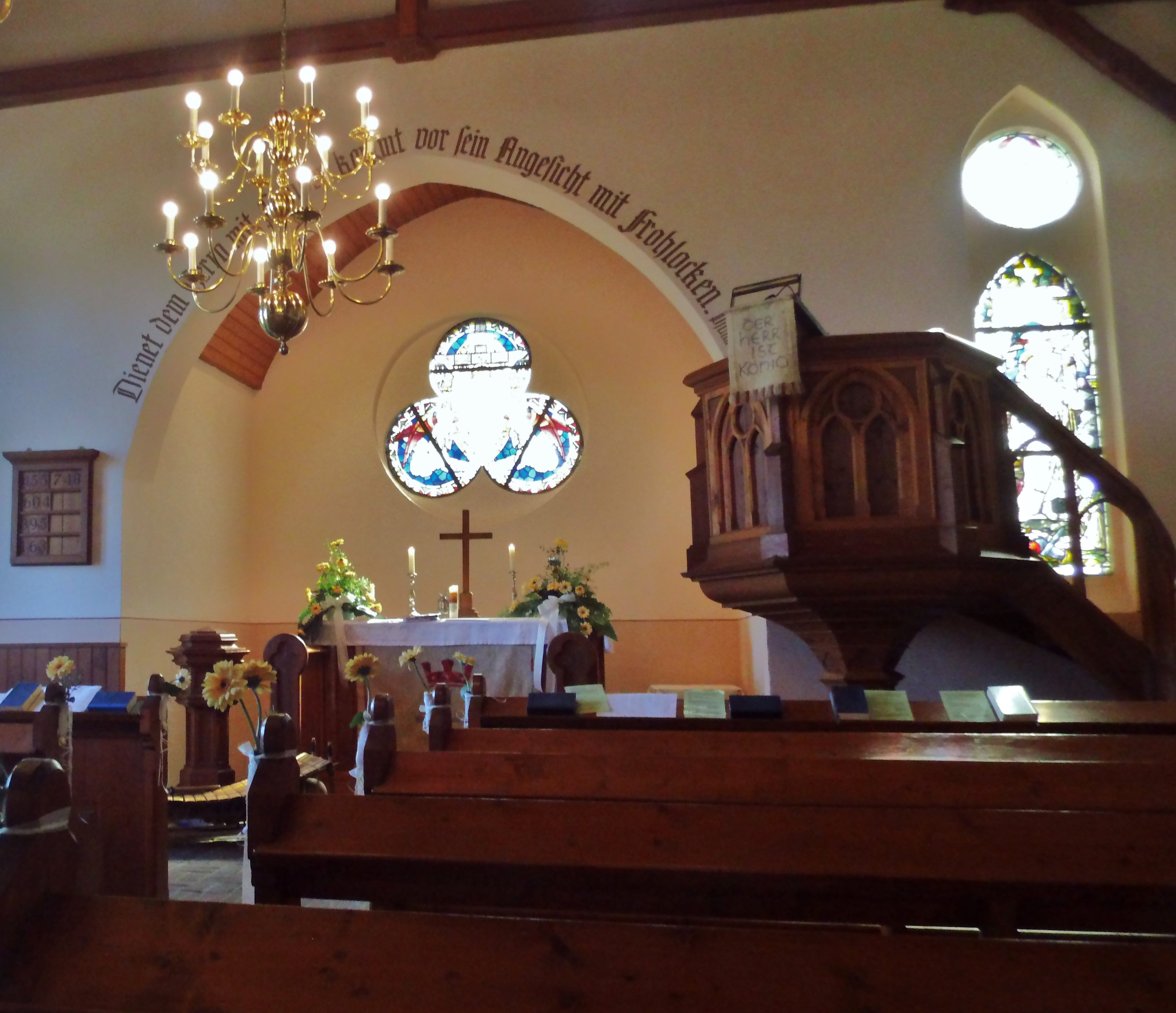 Inneres der Marcardsmoorer Kirche